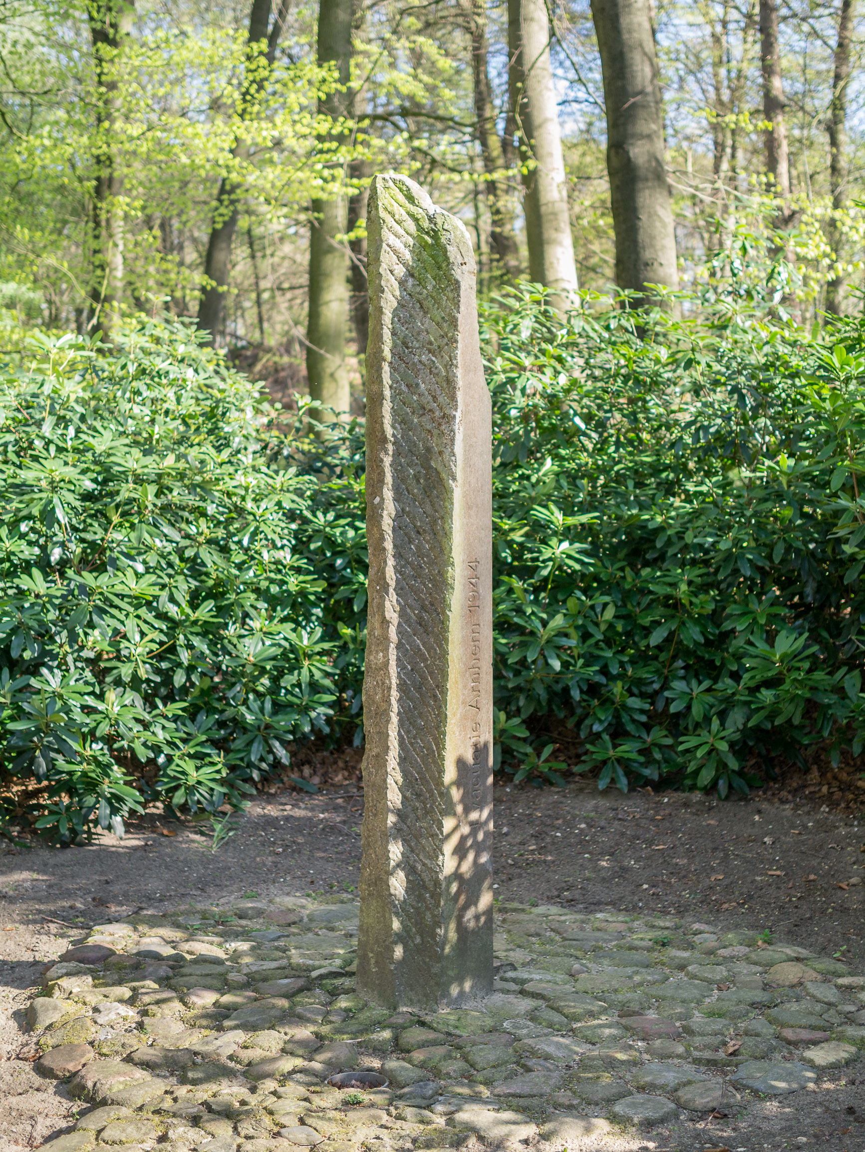 Evacuatie Arnhem 1944. Monument in het Openluchtmuseum. Dit oorlogsgedenkteken is bij de herdenking van 1984 geschonken door de ex-vacuées die van september 1944 tot januari 1945 in het Openluchtmuseum verbleven. Het waren ongeveer 600 mensen uit de omgeving van het museum die na de luchtlanding van de geallieerden, bekend onder de naam Market Garden, in het openluchtmuseum onderdak vonden. Bron:Informatiebord bij het monument.